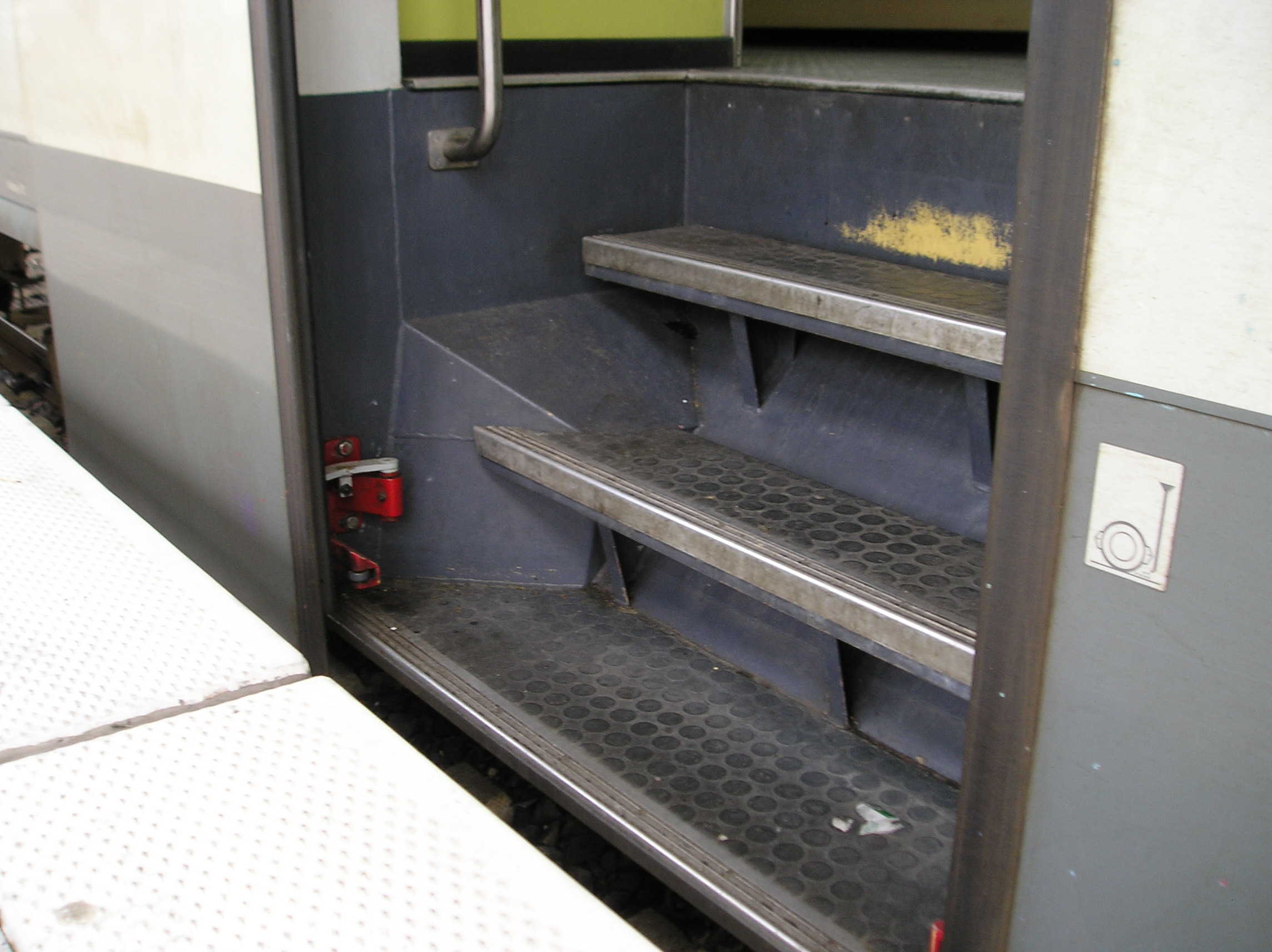 Das Bild zeigt den Einstiegsbereich eines 628.4 an einem 55 cm hohen Bahnsteig